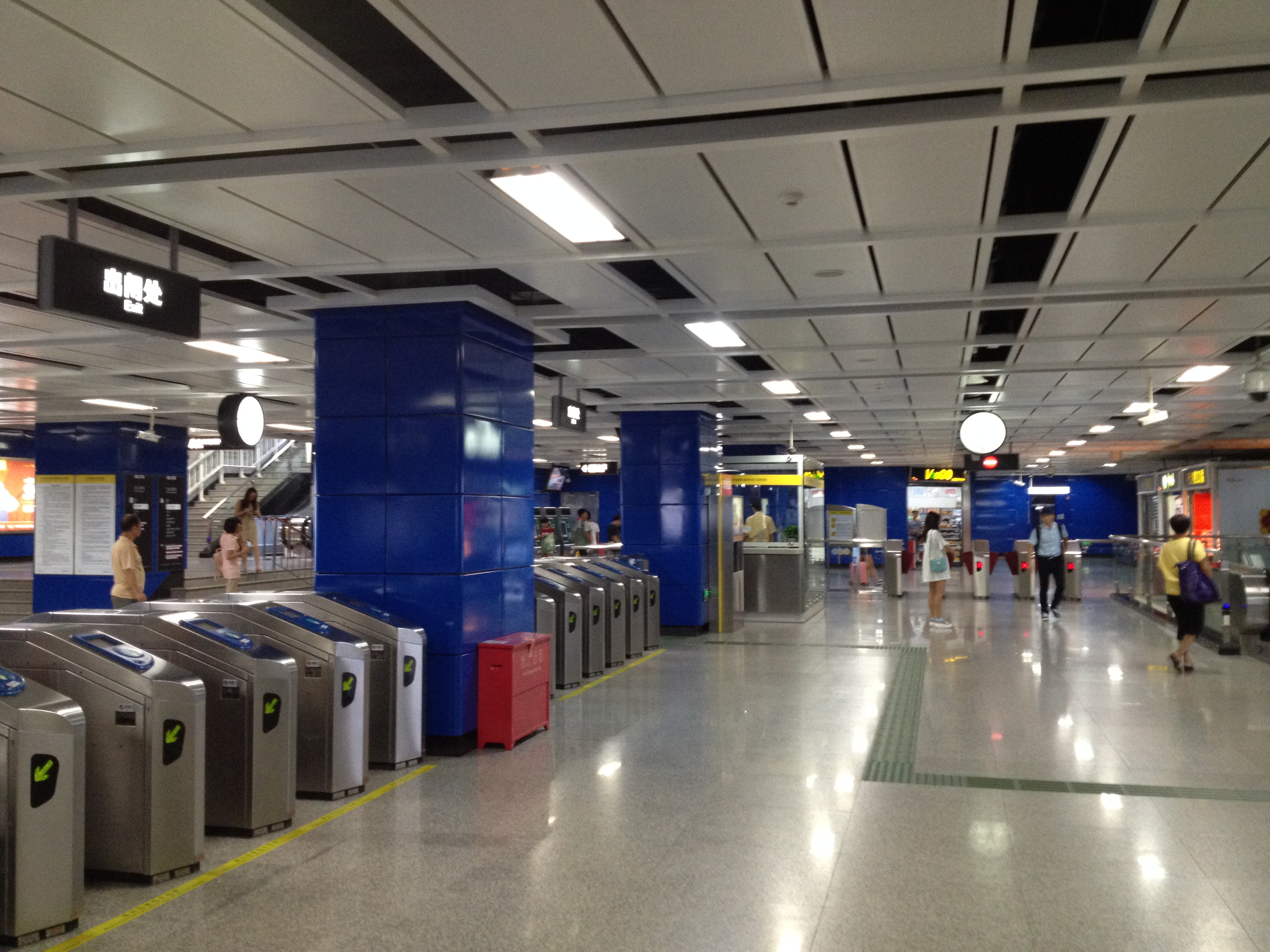 广州地铁凤凰新村站站厅